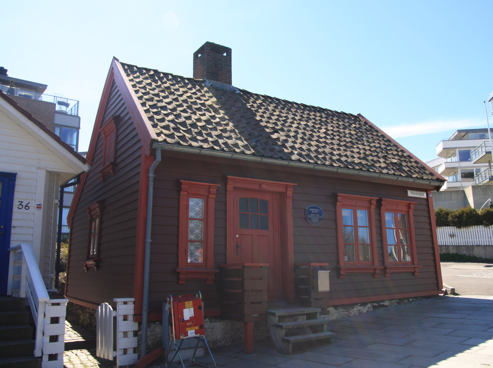 Hertervighuset